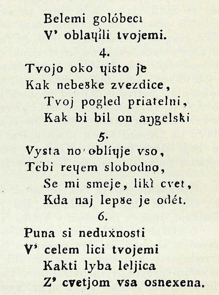 Fragment of "Posvetne pesmi", dajnčica